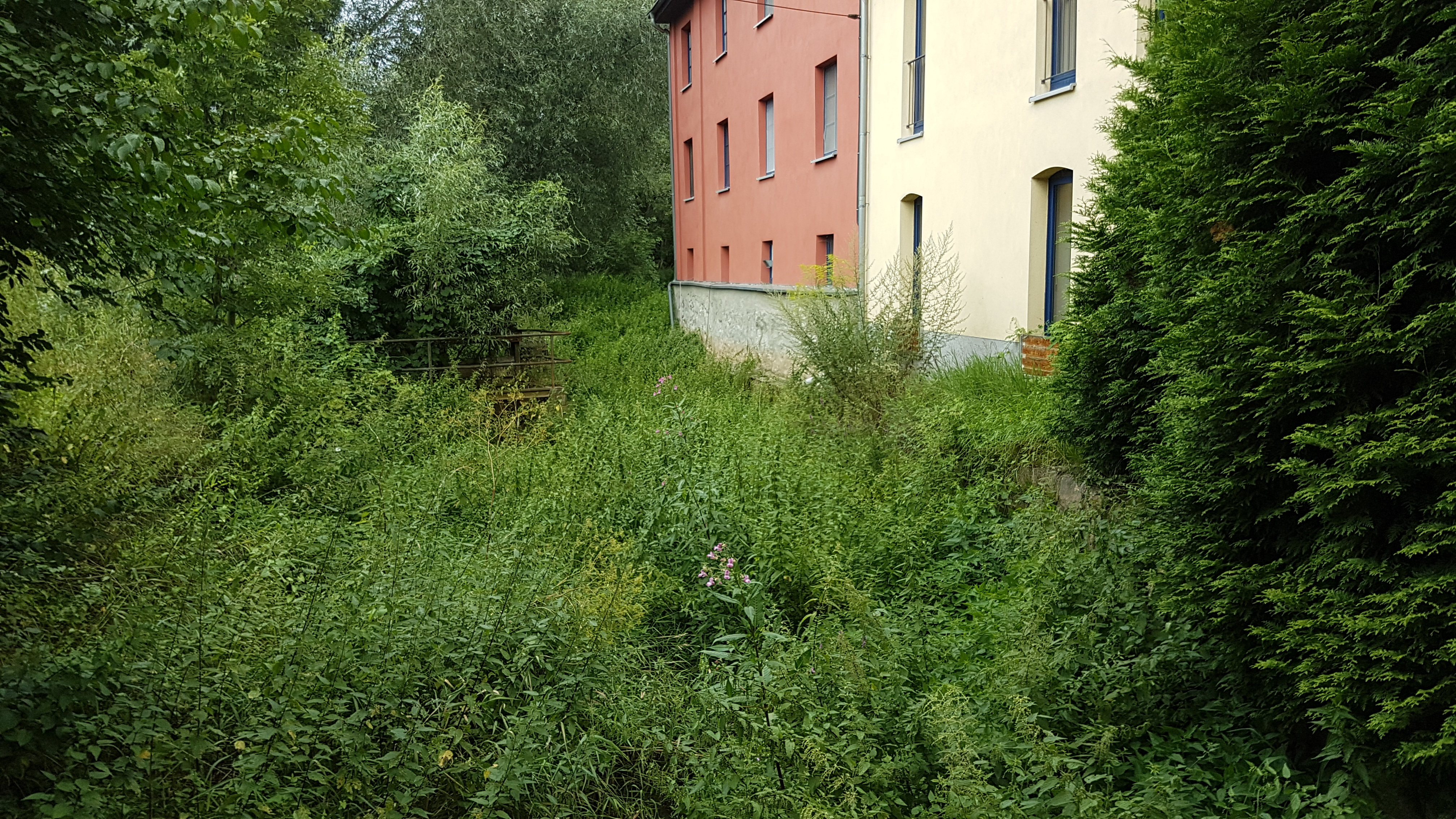 Bild von den Überresten der ehemaligen Wassermühle in Gaulis.